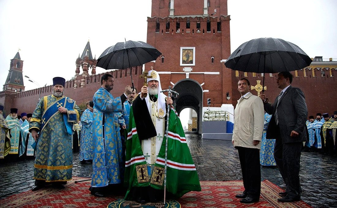 Церемония открытия надвратной иконы на Спасской башне Кремля